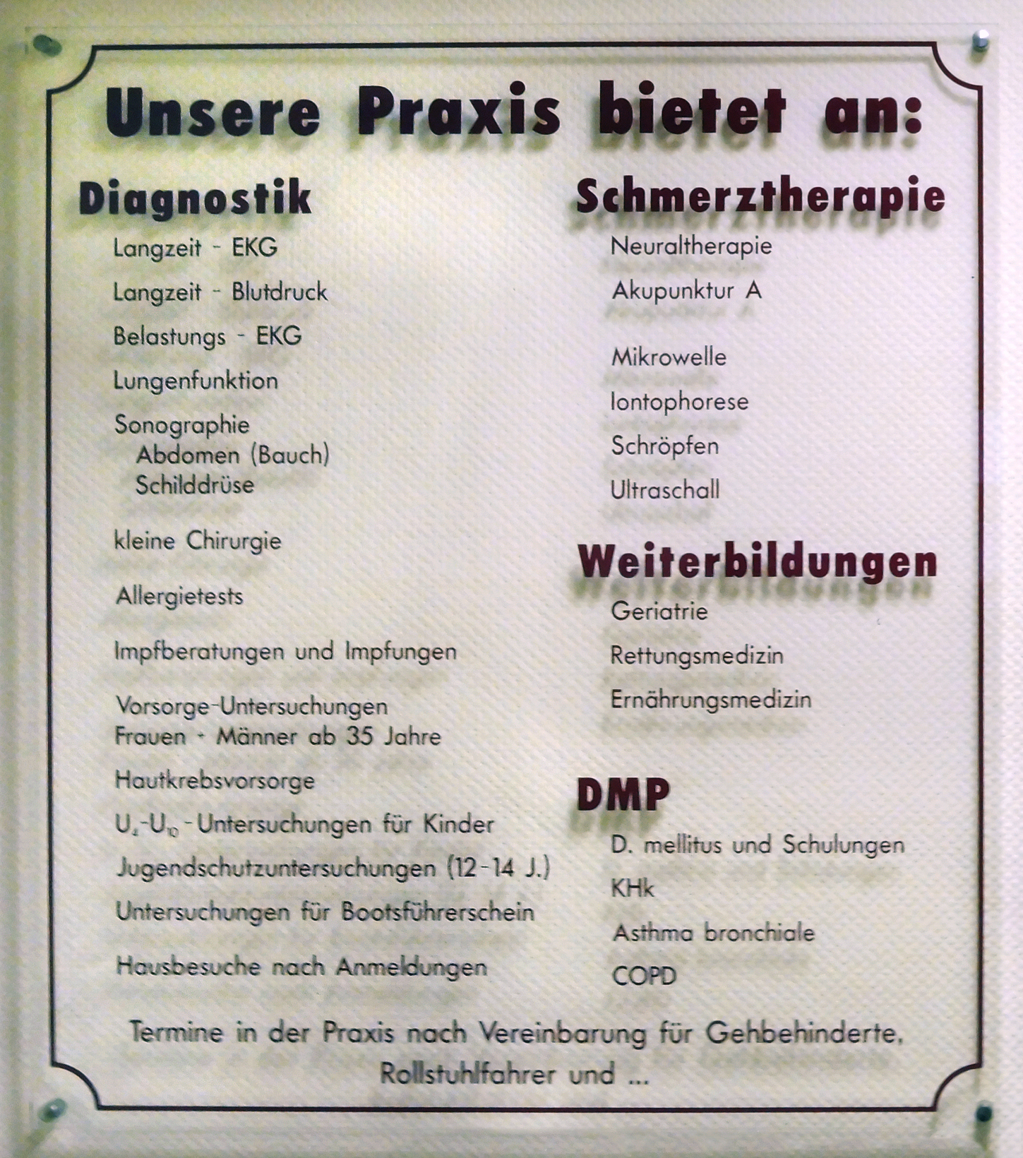 Leistungsangebot einer Arztpraxis in Mecklenburg